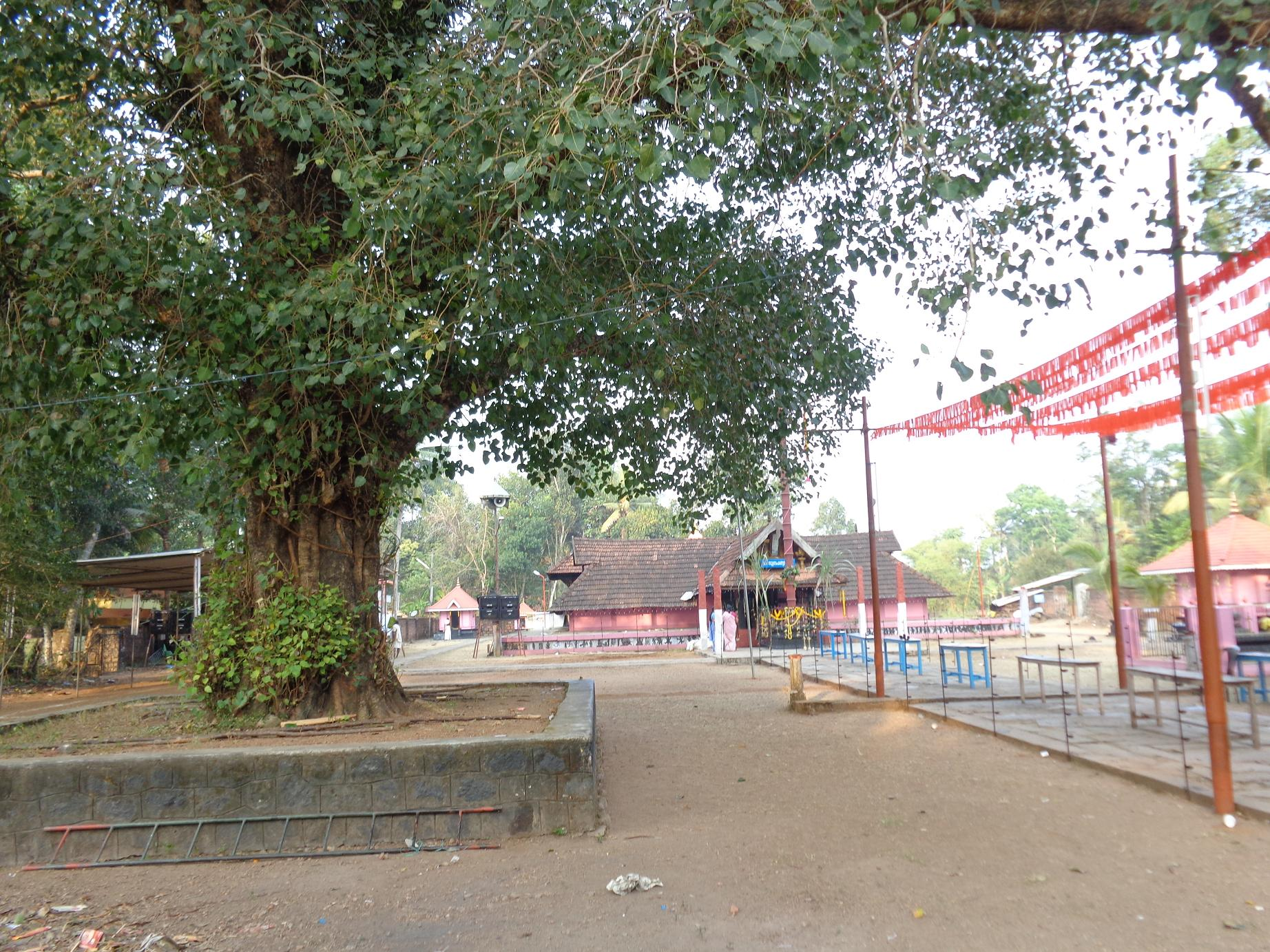 തൃപ്പാവൂർ കുളങ്ങര സുബ്രഹ്മണ്യക്ഷേത്രം കാഴ്ച